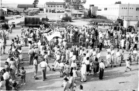 תהלוכת כבאי עפולה בכיכר העצמאות בתקופת המנדט עם דגל בריטניה והדגל העברי